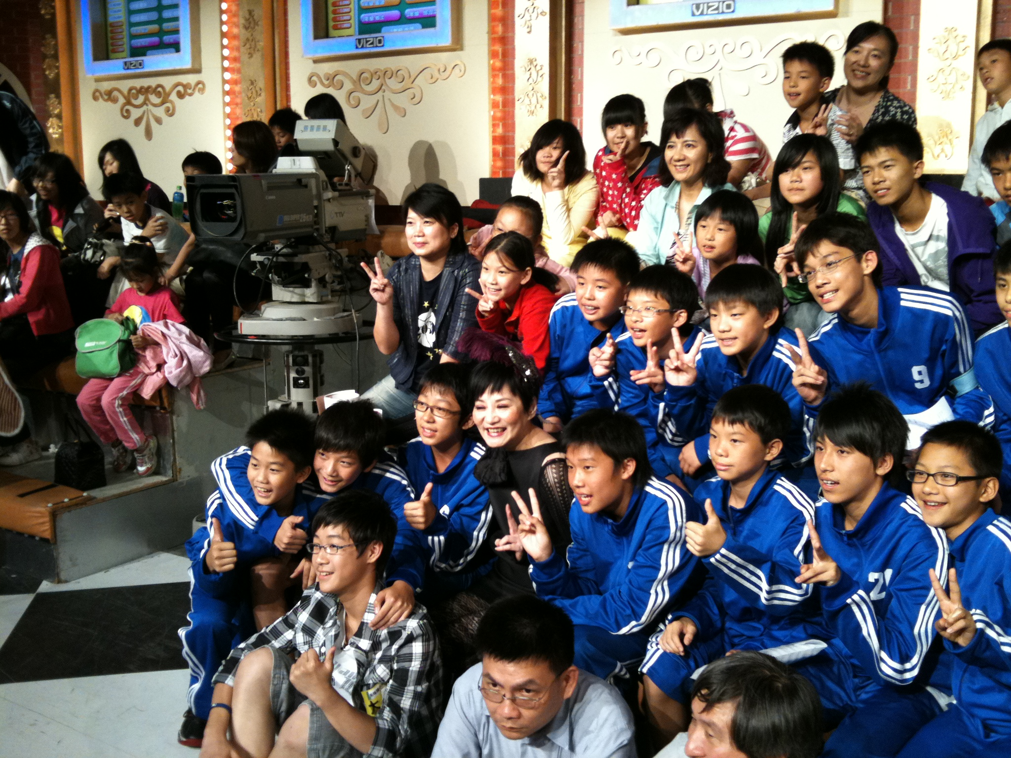 《百萬小學堂》陪考生大力（圖下穿方格衣、戴眼鏡者）與主持人張小燕（大力左後方穿黑衣者），以及大力在天母籃球隊的夥伴們。